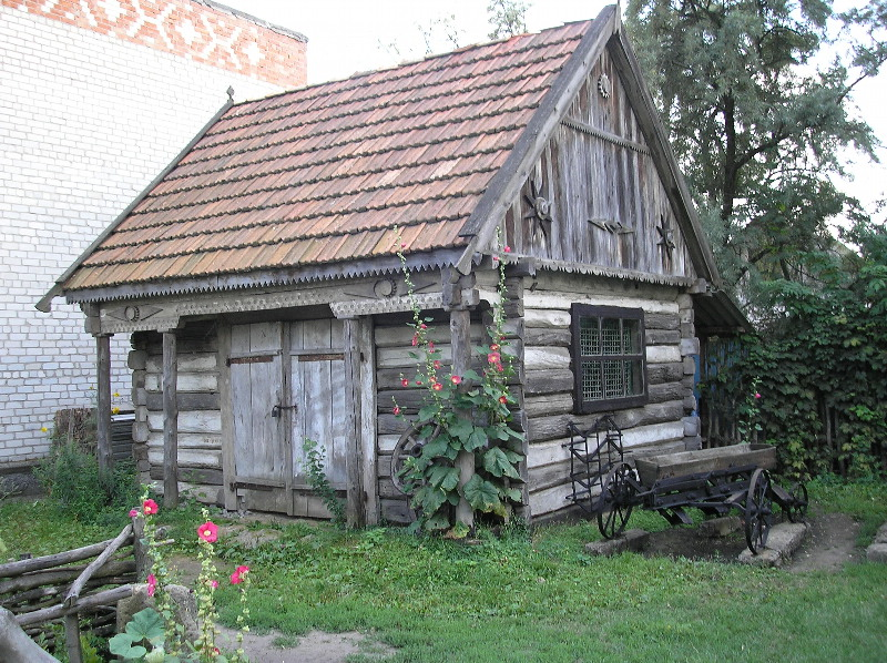 Village Prelesne. Ukraine. Donetsk region.